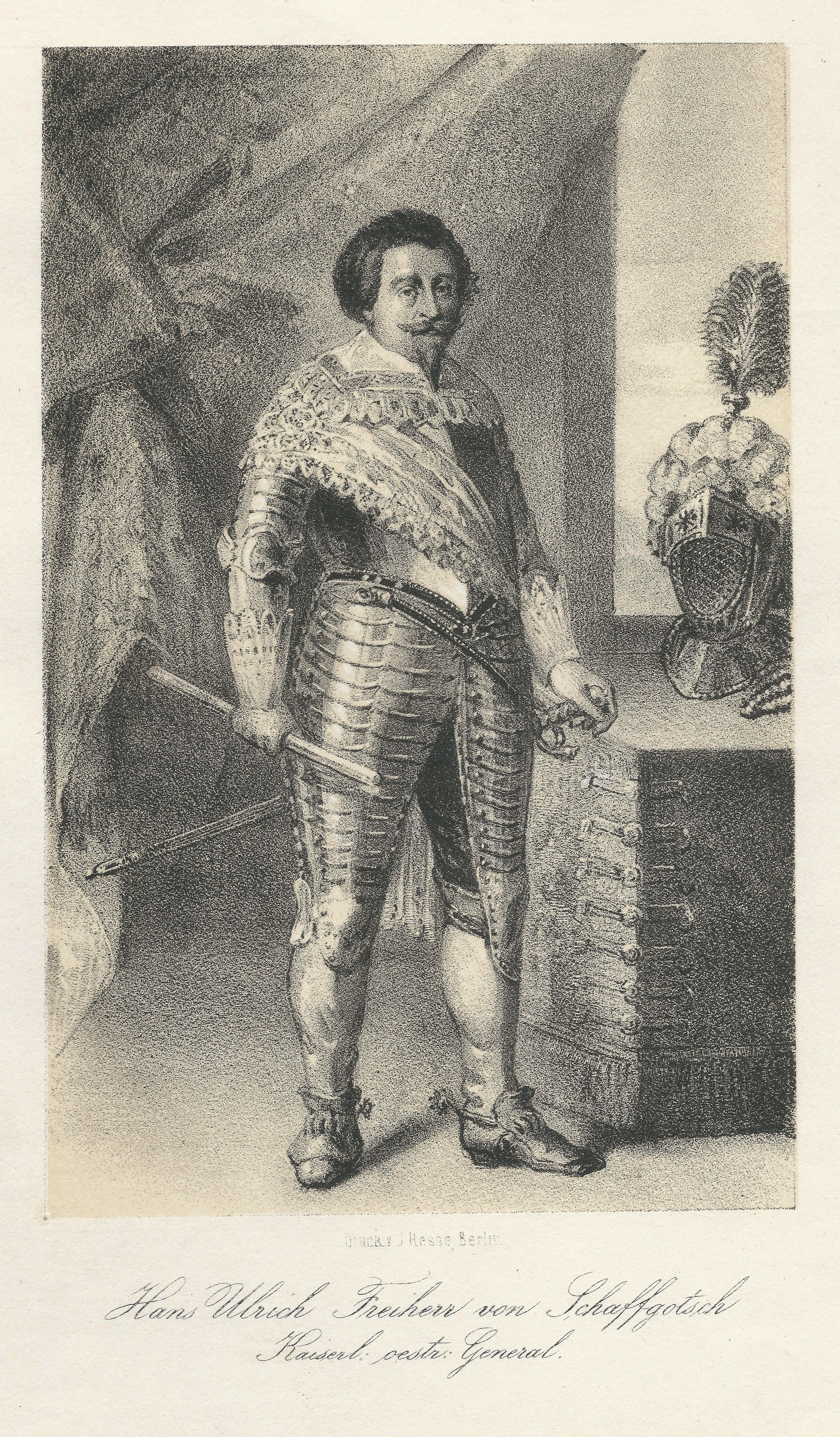 Freiherr Hans Ulrich Schaffgotsch, kaiserl. General der Kavallerie im dreißigjährigen Krieg